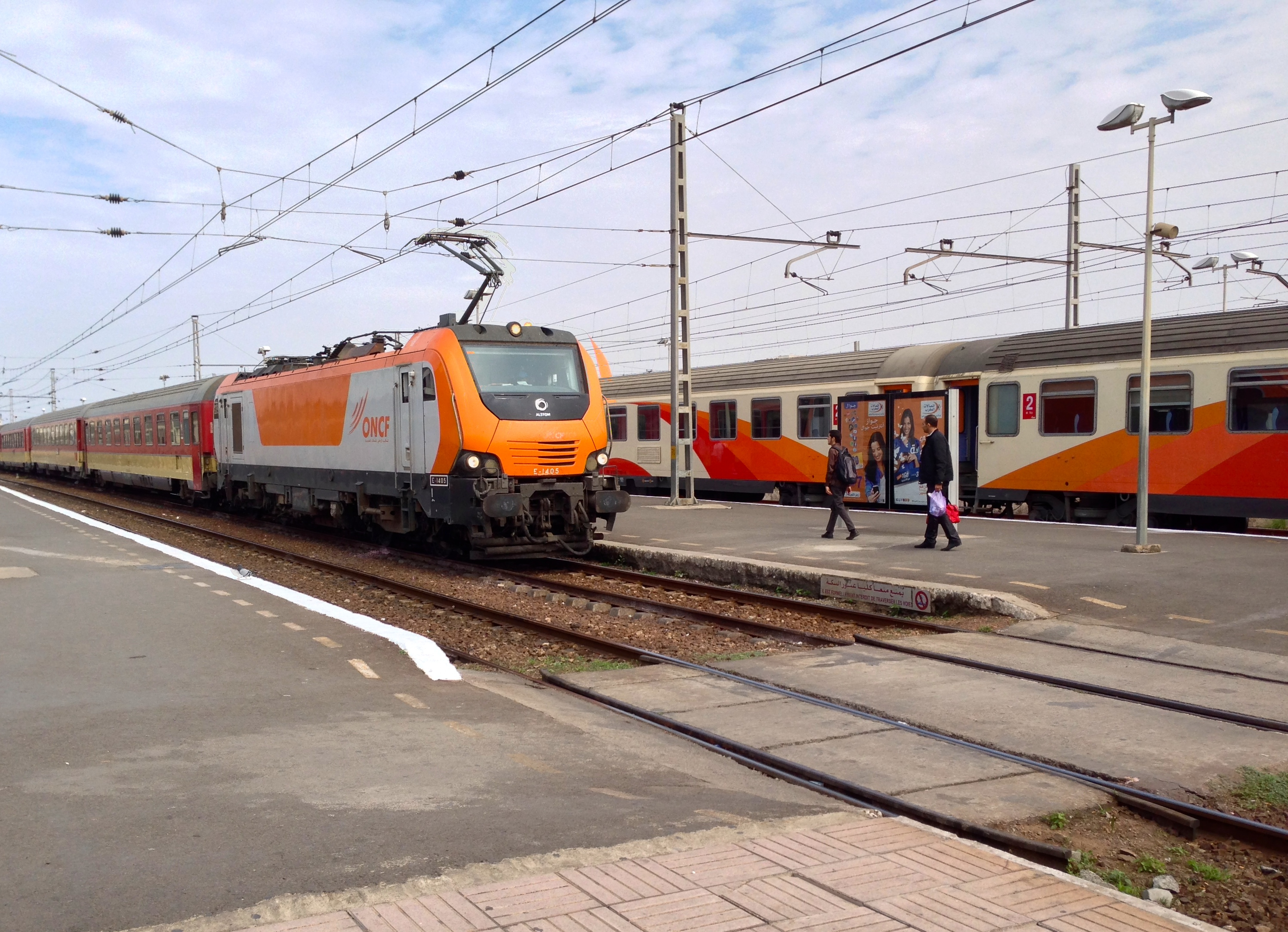 ONCF